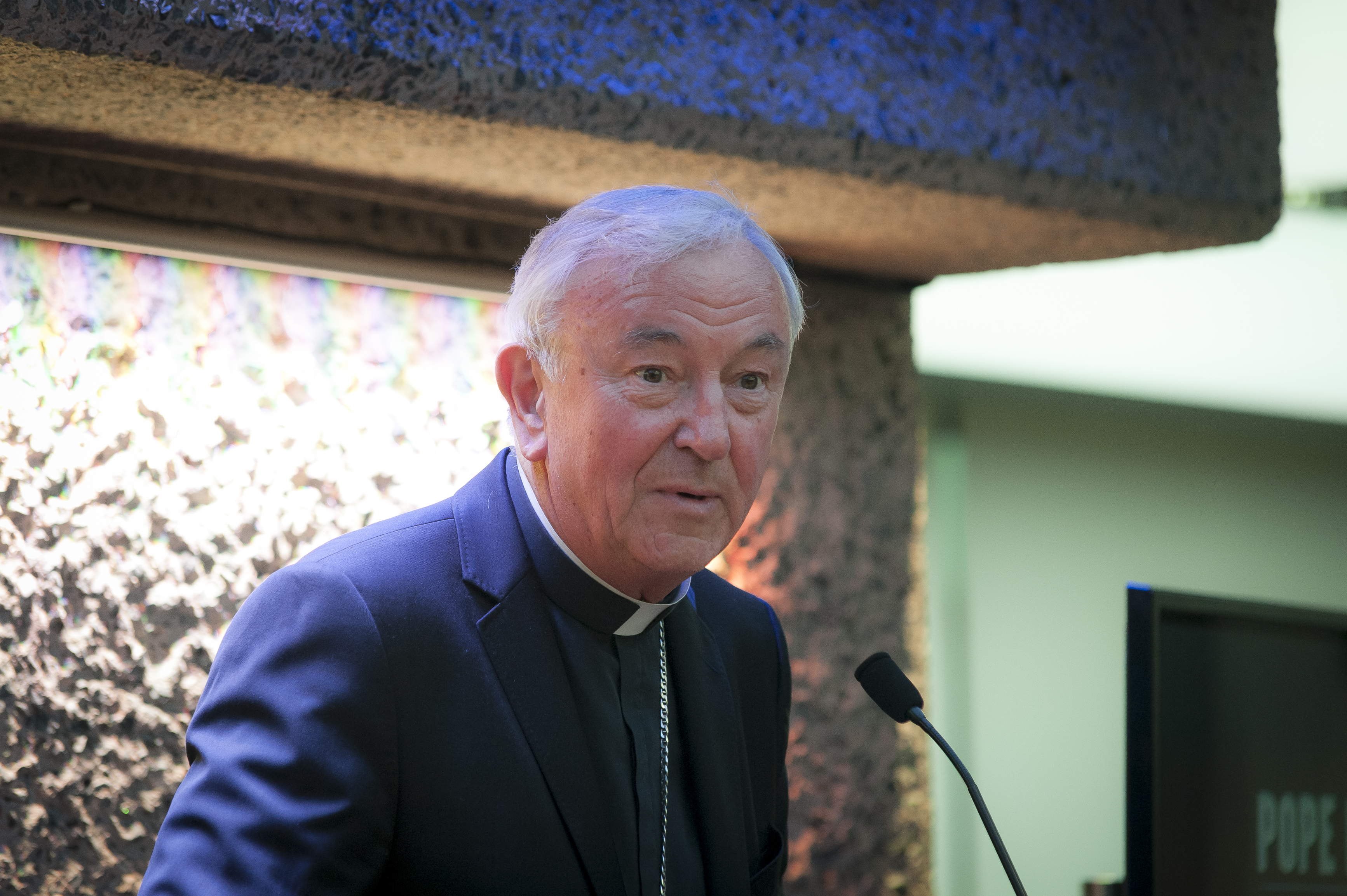 Le cardinal Vincent Nichols à remise des prix de l'édition 2016 du "Celebrating Young People".